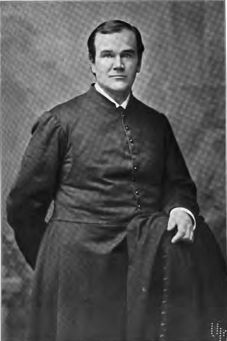 Fr. Edward McGlynn, about 1870